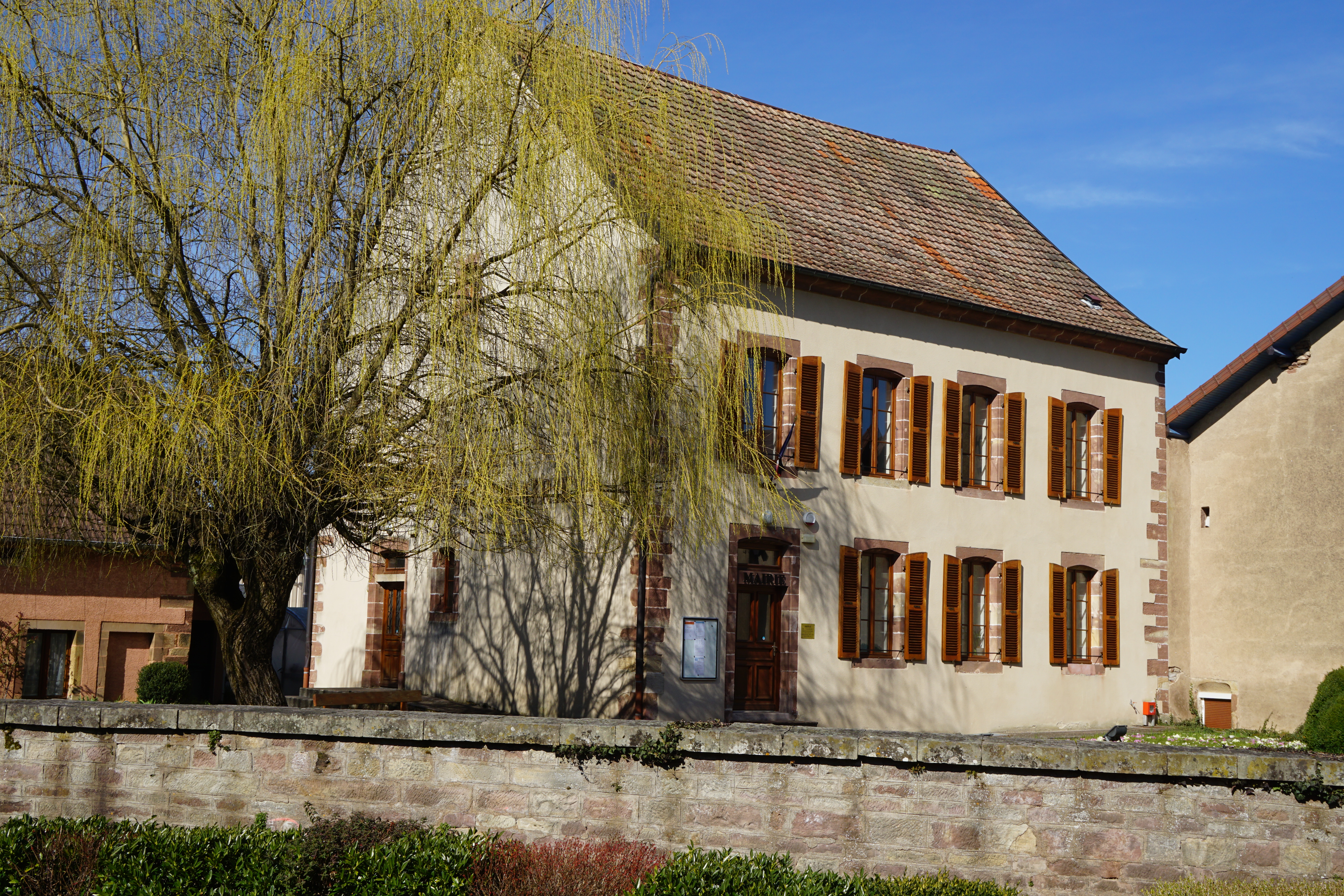 Mairie de Moffans-et-Vacheresse.